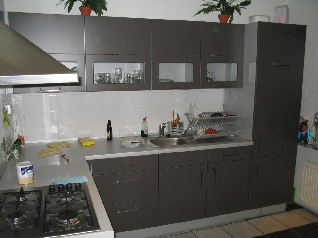 keuken / kitchen